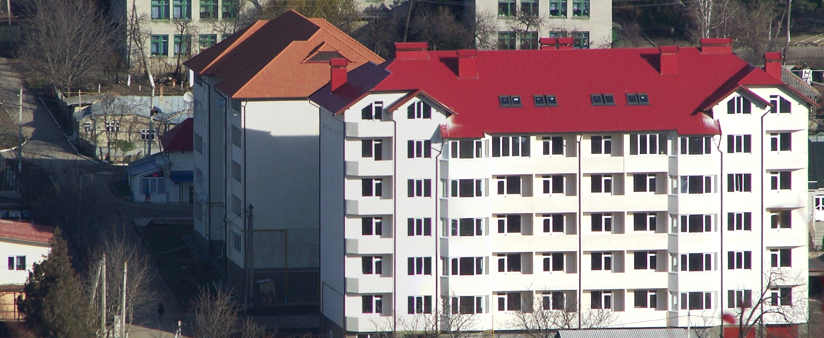 Новострои. 2 пятиэтажных жилых дома, построенных во второй половине 2000-х годов.